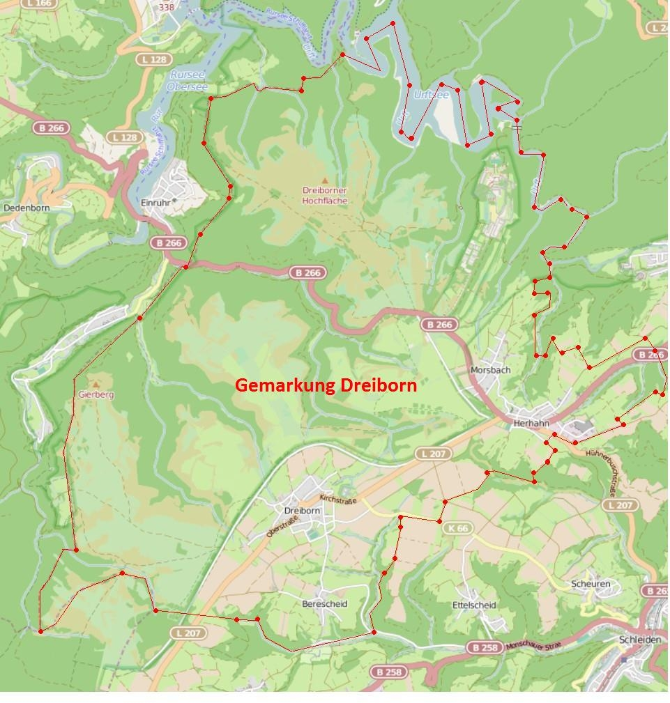 Dreiborn, in der Gemarkung Dreiborn